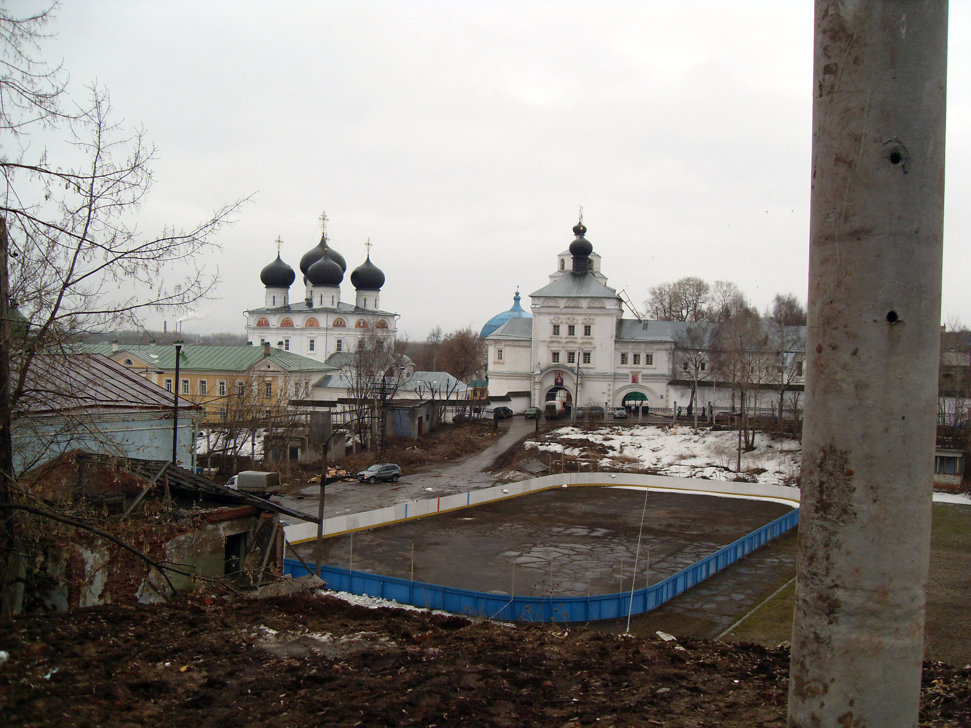 Стадион Трудовые Резервы г. Киров